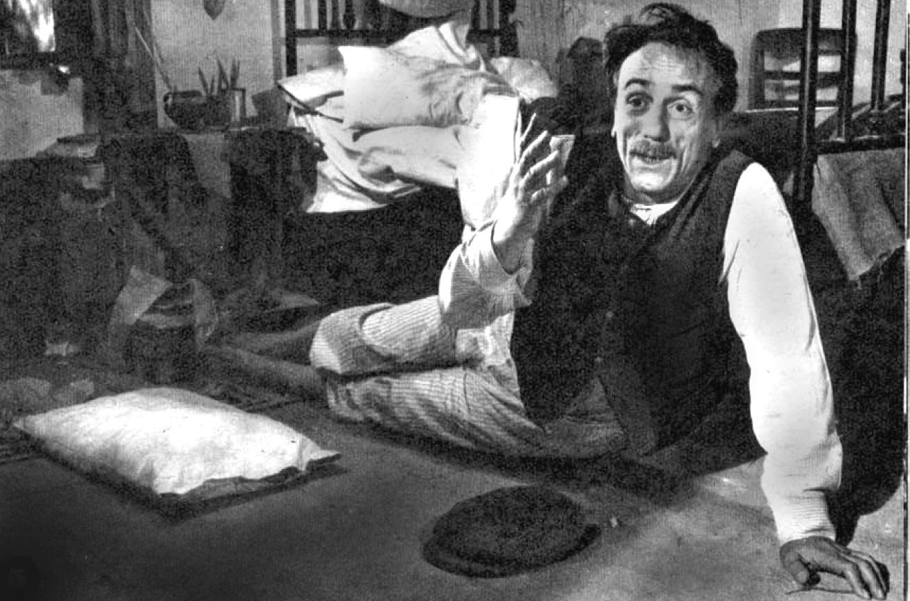 Eduardo de Filippo nel primo episodio di "Marito e moglie" da lui diretto ed interpretato.